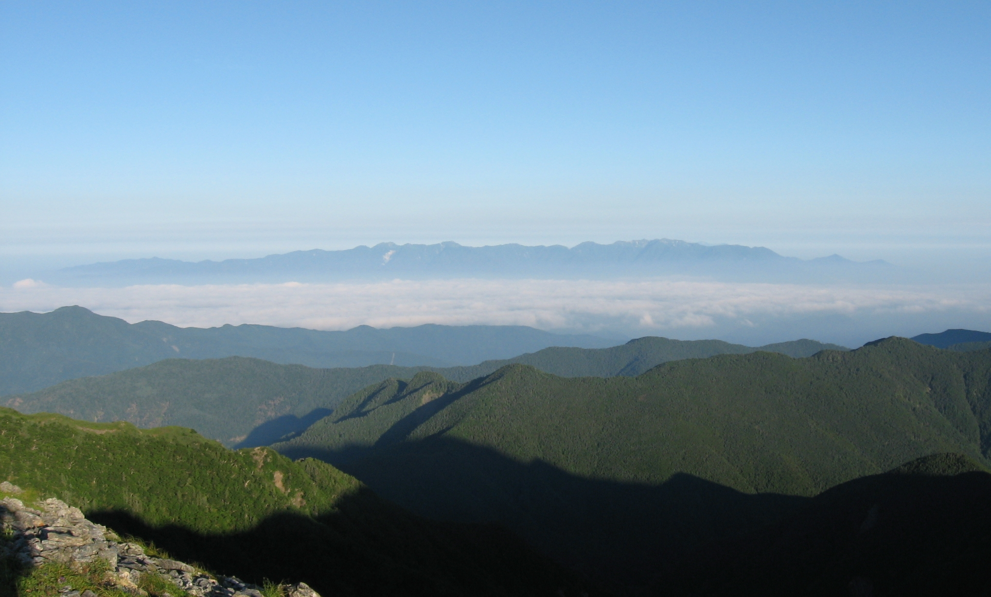 北岳山荘付近より中央アルプス